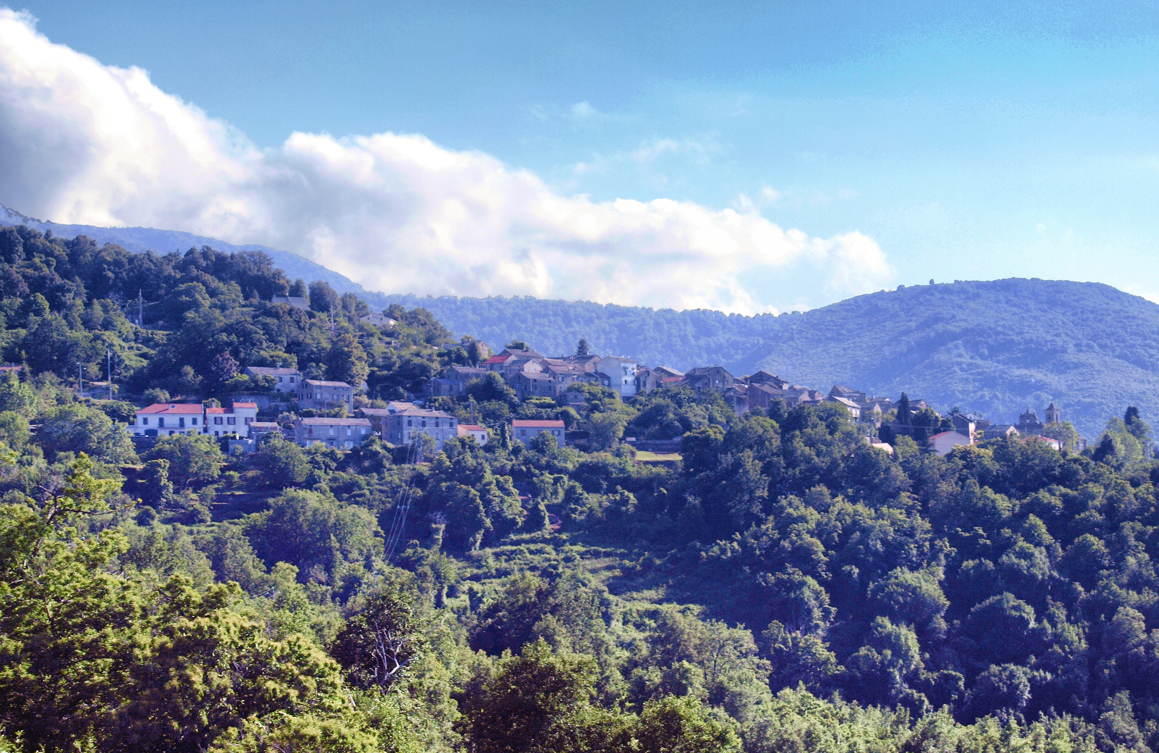 Rutali, Nebbio (Corse) - Vue du village